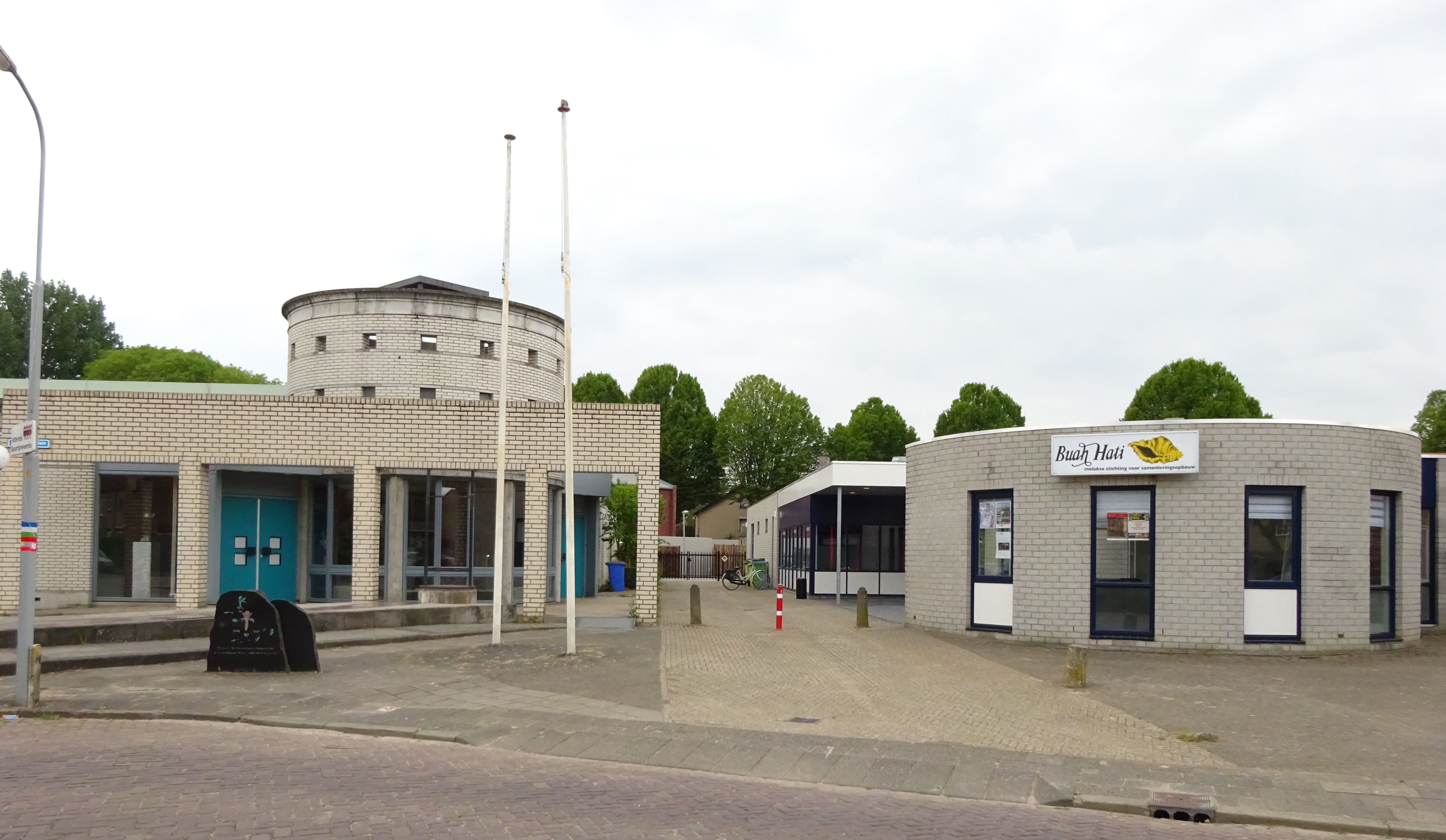 Molukse kerk en gemeenschapshuis in Tiel